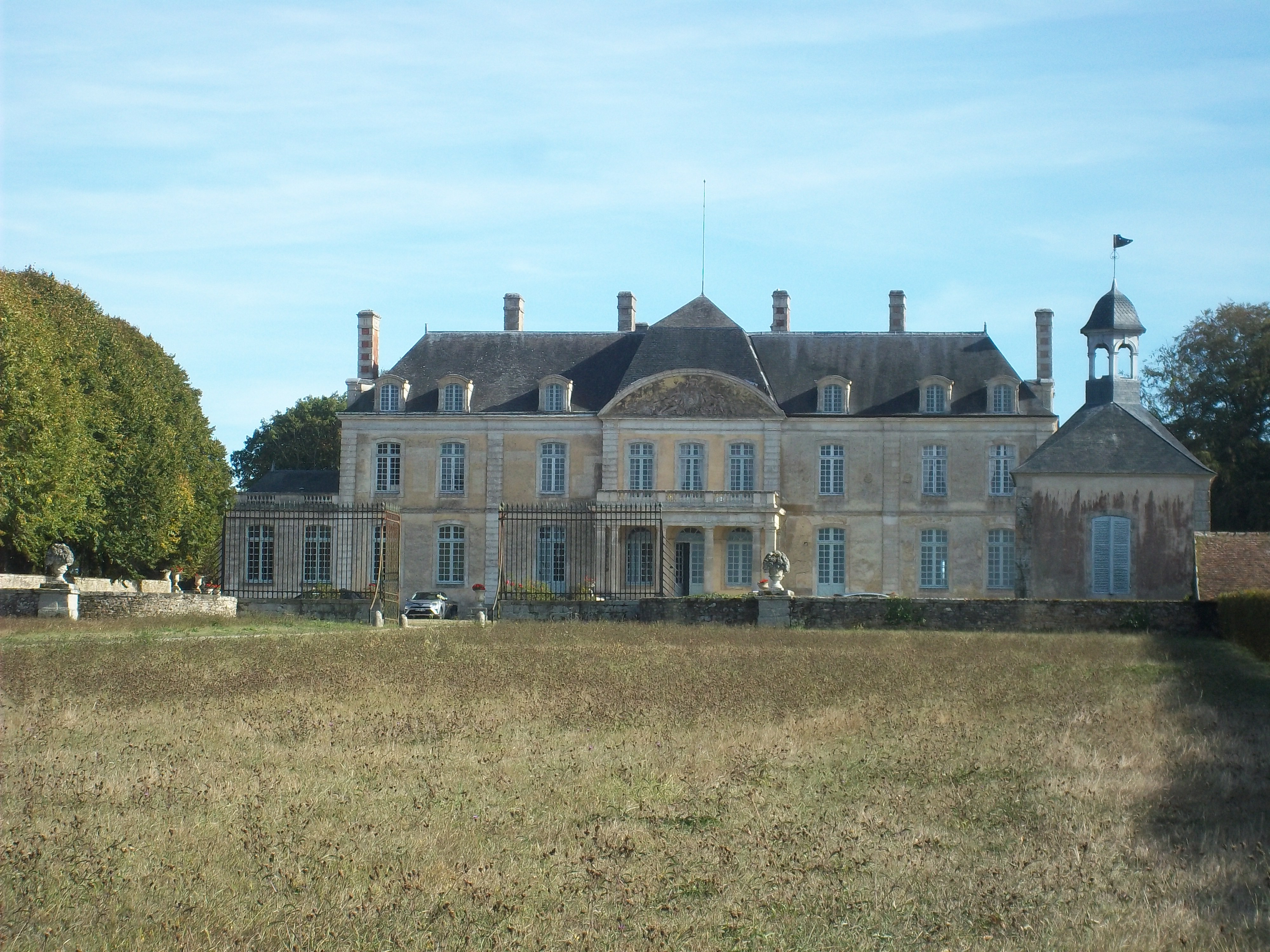 Chateau de saint-Rigomer - Sarthe - France